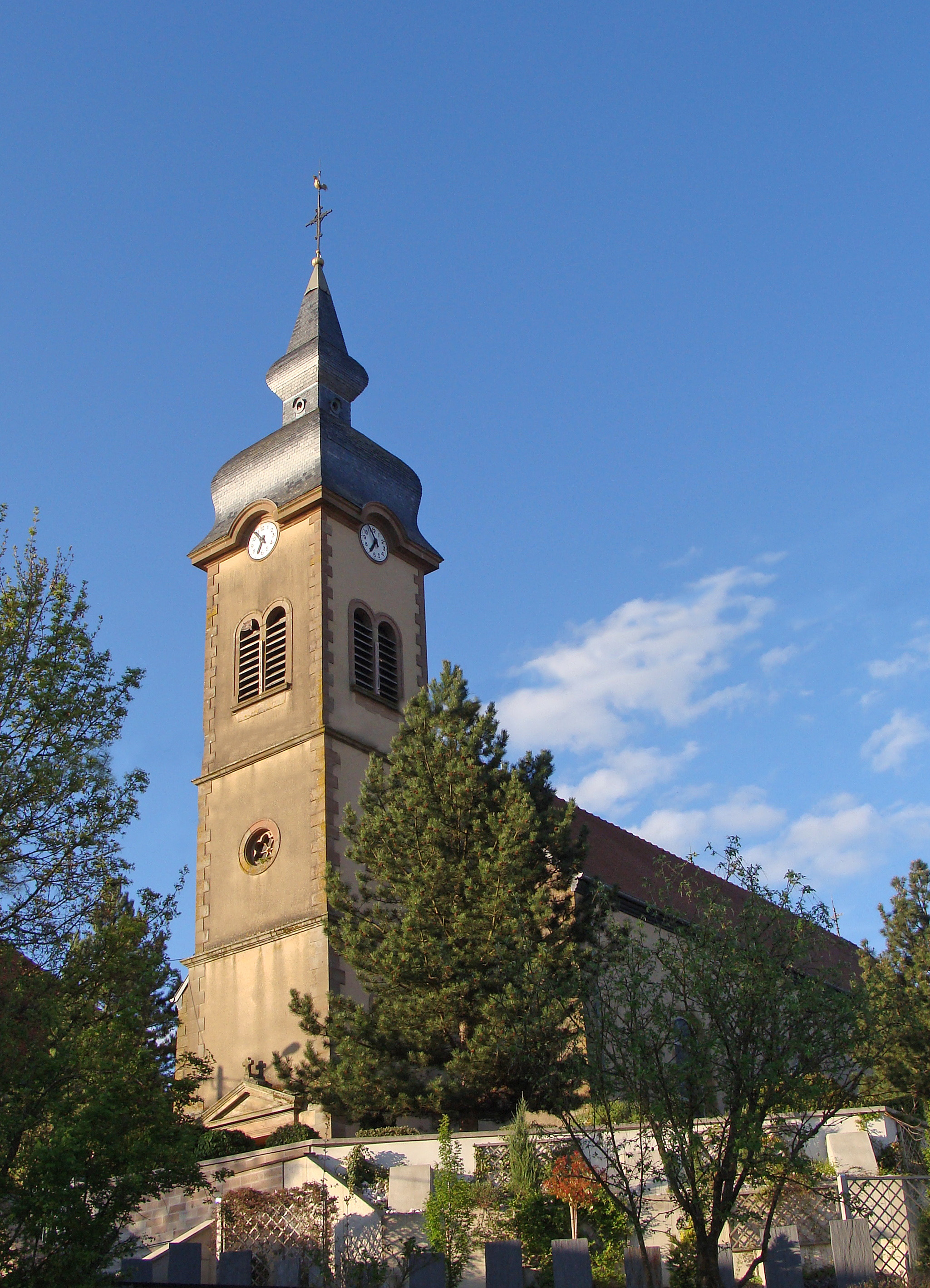 Église Sainte-Croix (1730) de Hilsprich, rénovée en 1946-1949 à la suite des dommages subis pendant la Seconde Guerre mondiale.